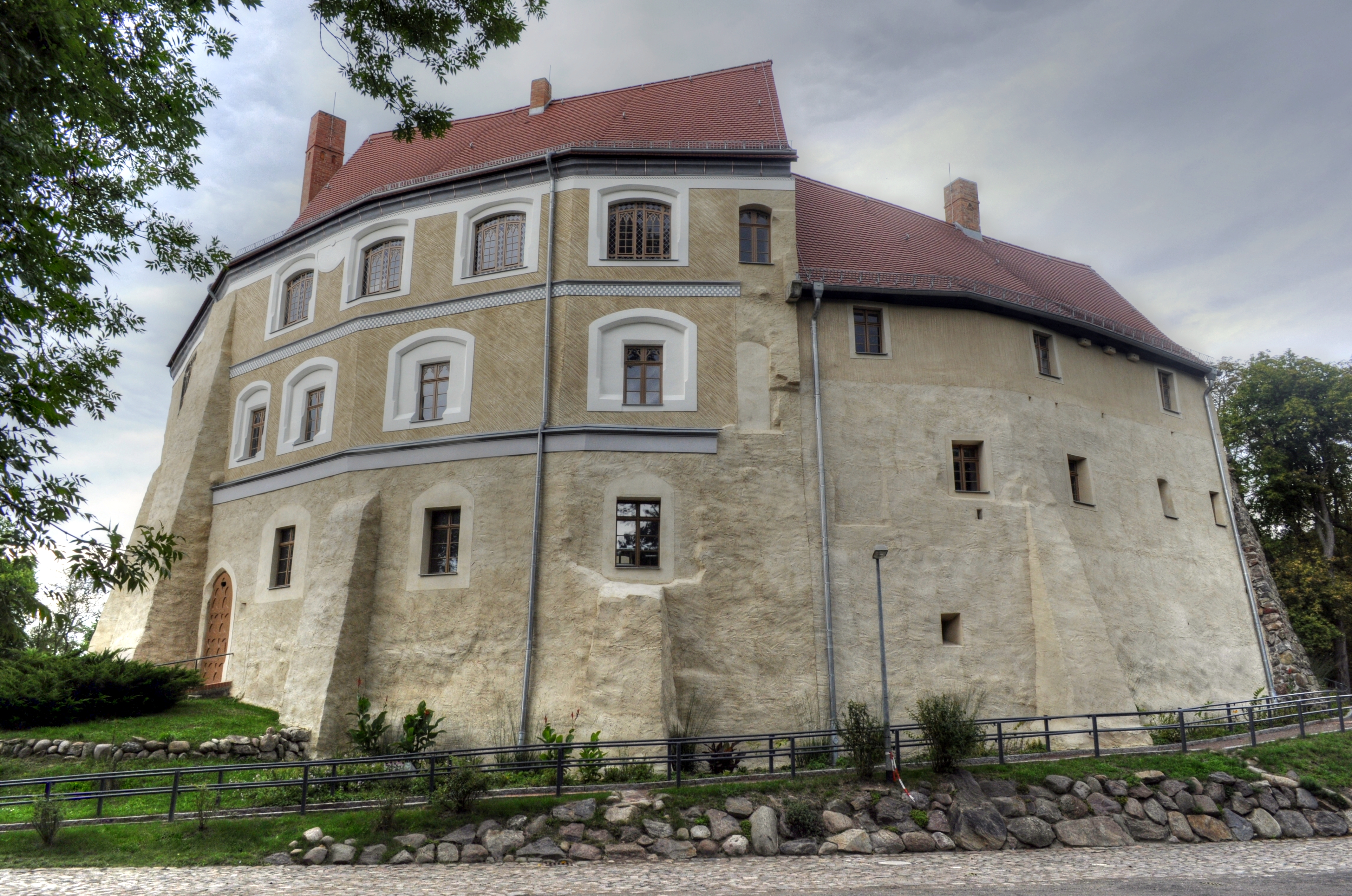 Ritterburg in Dessau-Roßlau